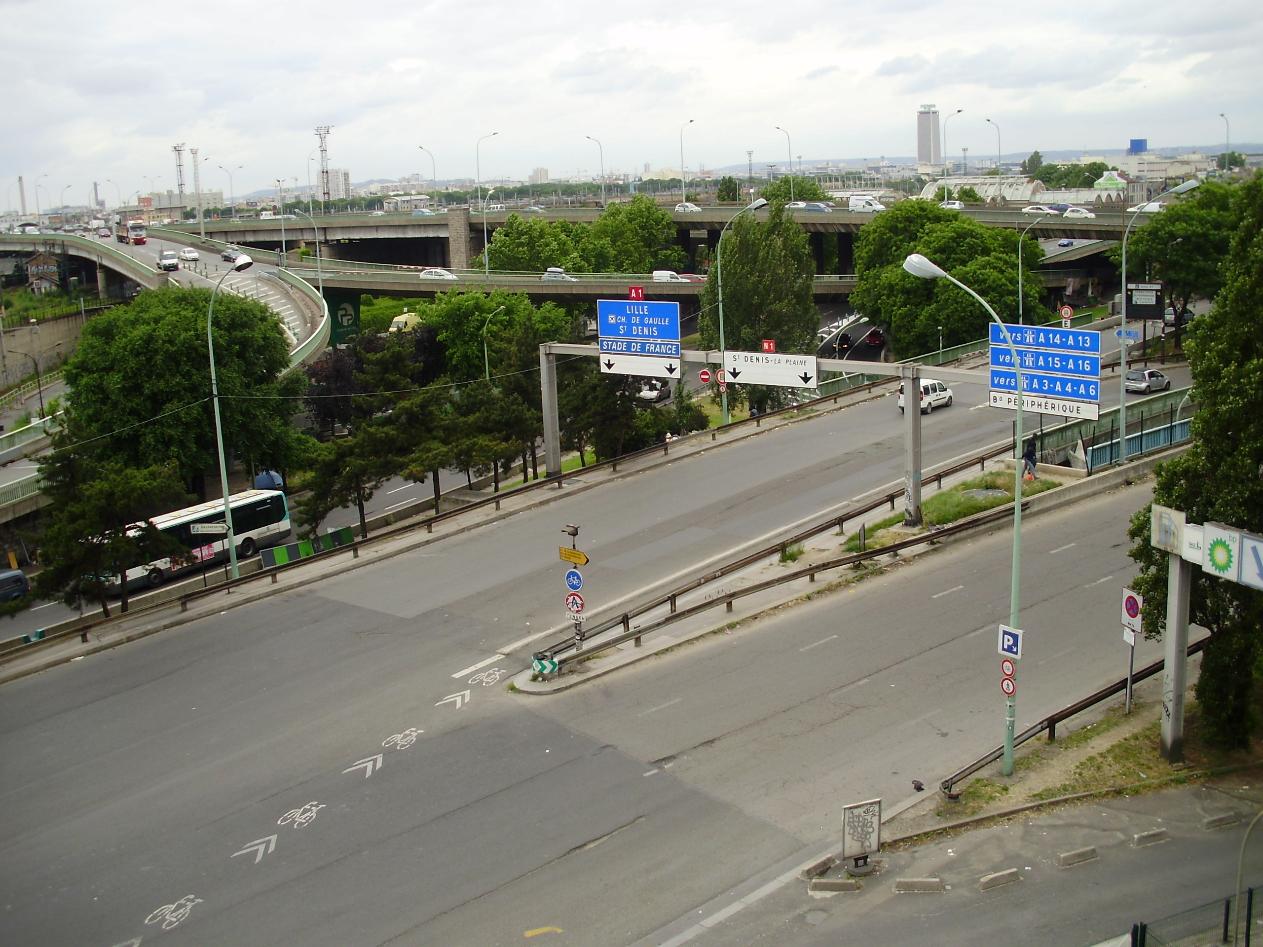 Échangeur de la porte de la Chapelle sur le boulevard périphérique de Paris, France, dans le 18e arrondissement de Paris